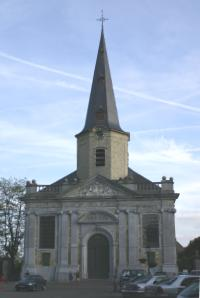 classicistische Sint-Martinuskerk te Moerzeke, eigen foto